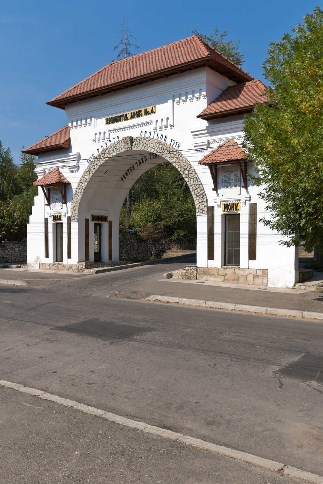 Fotografia prezinta Poarta Eroilor de pe str. Trivale 54, vazuta dinspre E.